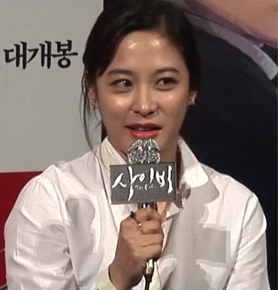 (사이비) 기자 간담회 영상